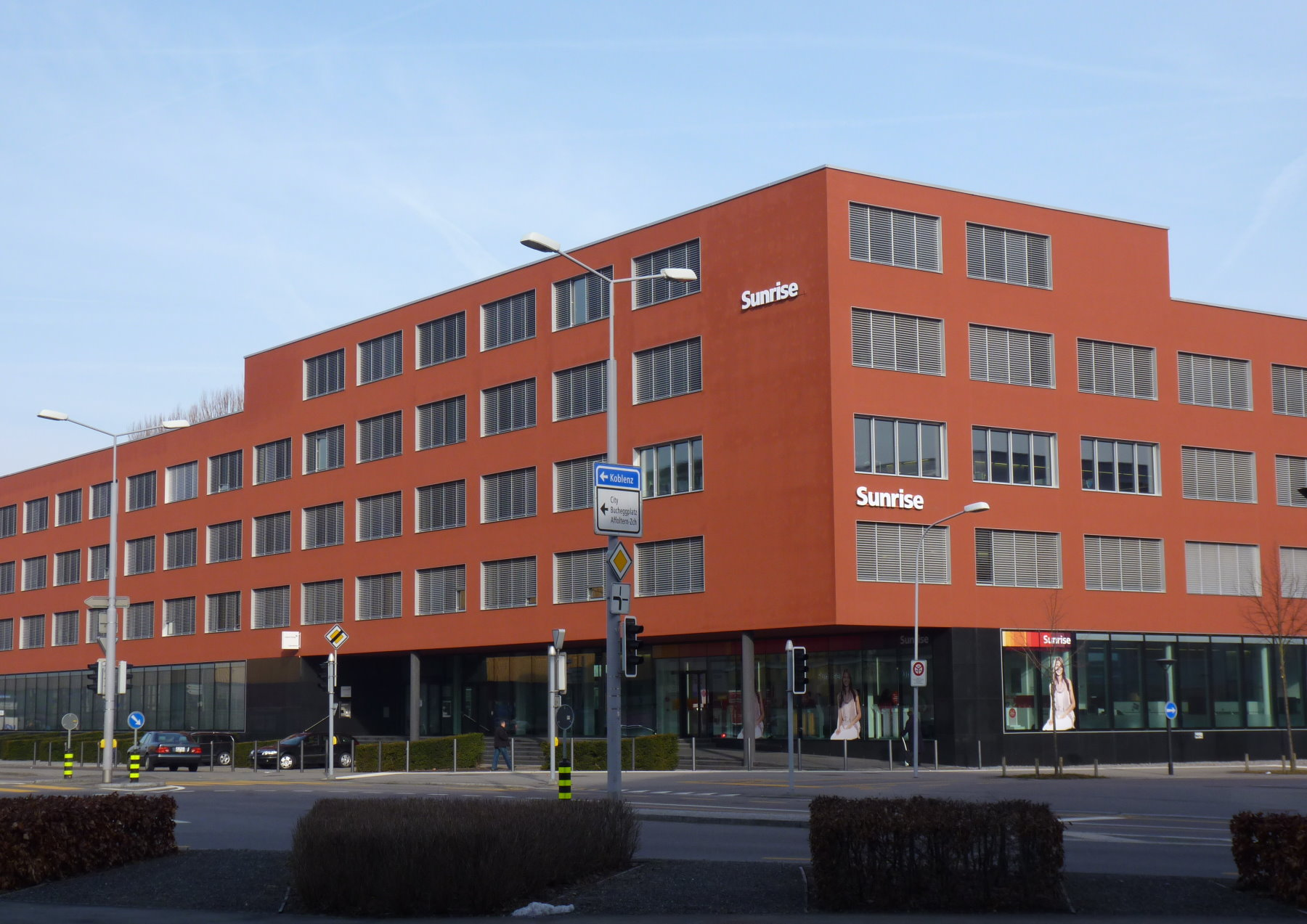 Sunrise Headquarters in Zurich, Switzerland